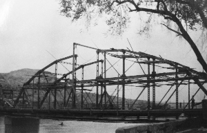 1954年中山桥加固工程，拱形钢梁即将合龙。